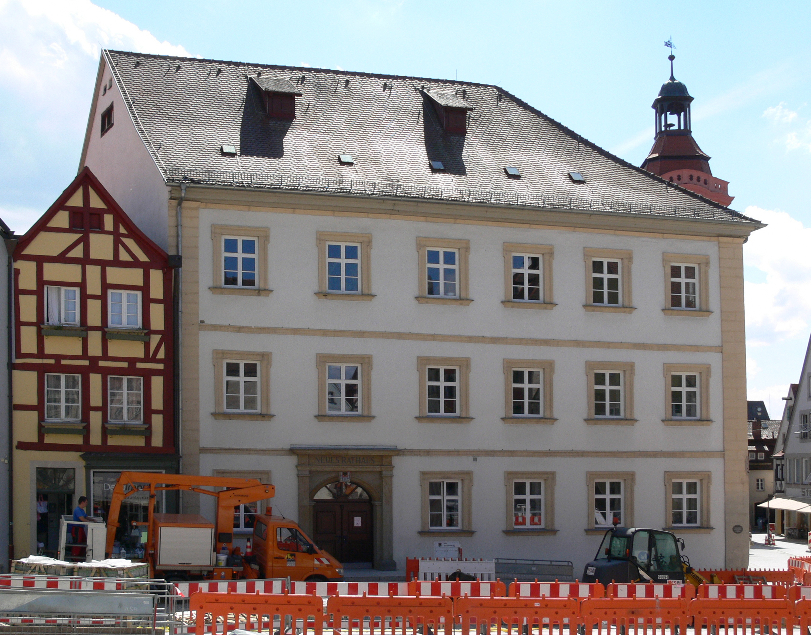 Neues Rathaus in Weißenburg (Bayern)